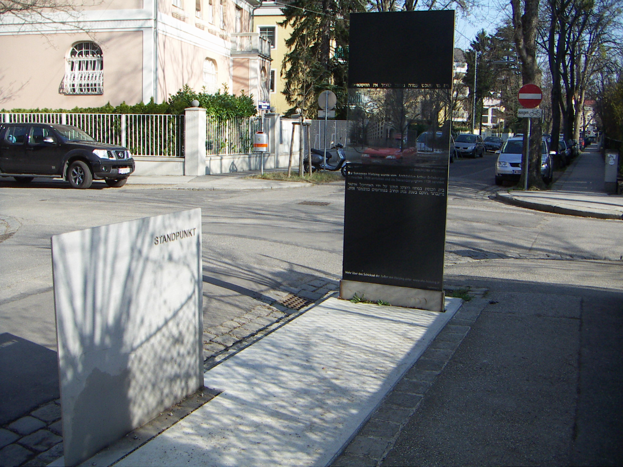 Gedenkobjekt Synagoge Hietzing 1926-1938 Vienna, Hans Kupelwieser 2004, ein Projekt der Volkshochschule Hietzing